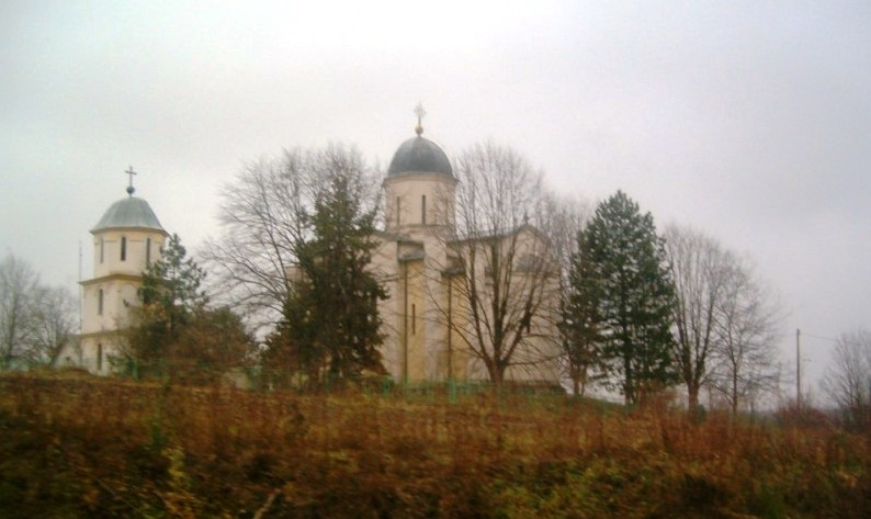 Црква у Вукони.